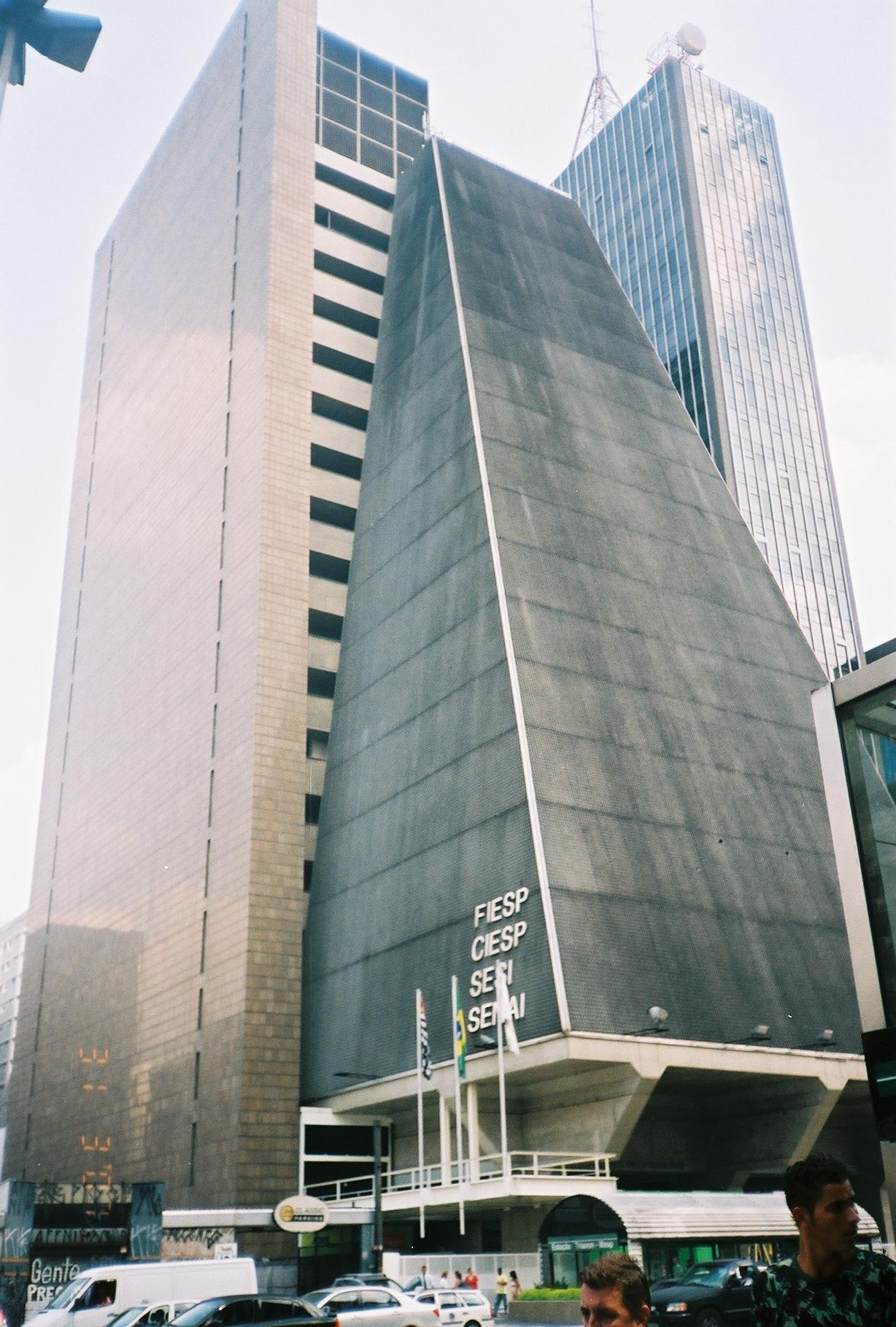 Prédio da Federação das Industrias do Estado de São Paulo (Fiesp), Centro das Industrias do Estado de São Paulo (Ciesp), Serviço Nacional da Indústria (Senai) e Serviço Social da Indústria (Sesi). Localizados na avenida Paulista, 1313, no Edifício Luiz Eulálio Bueno Vidigal Filho, em São Paulo, SP, Brasil.